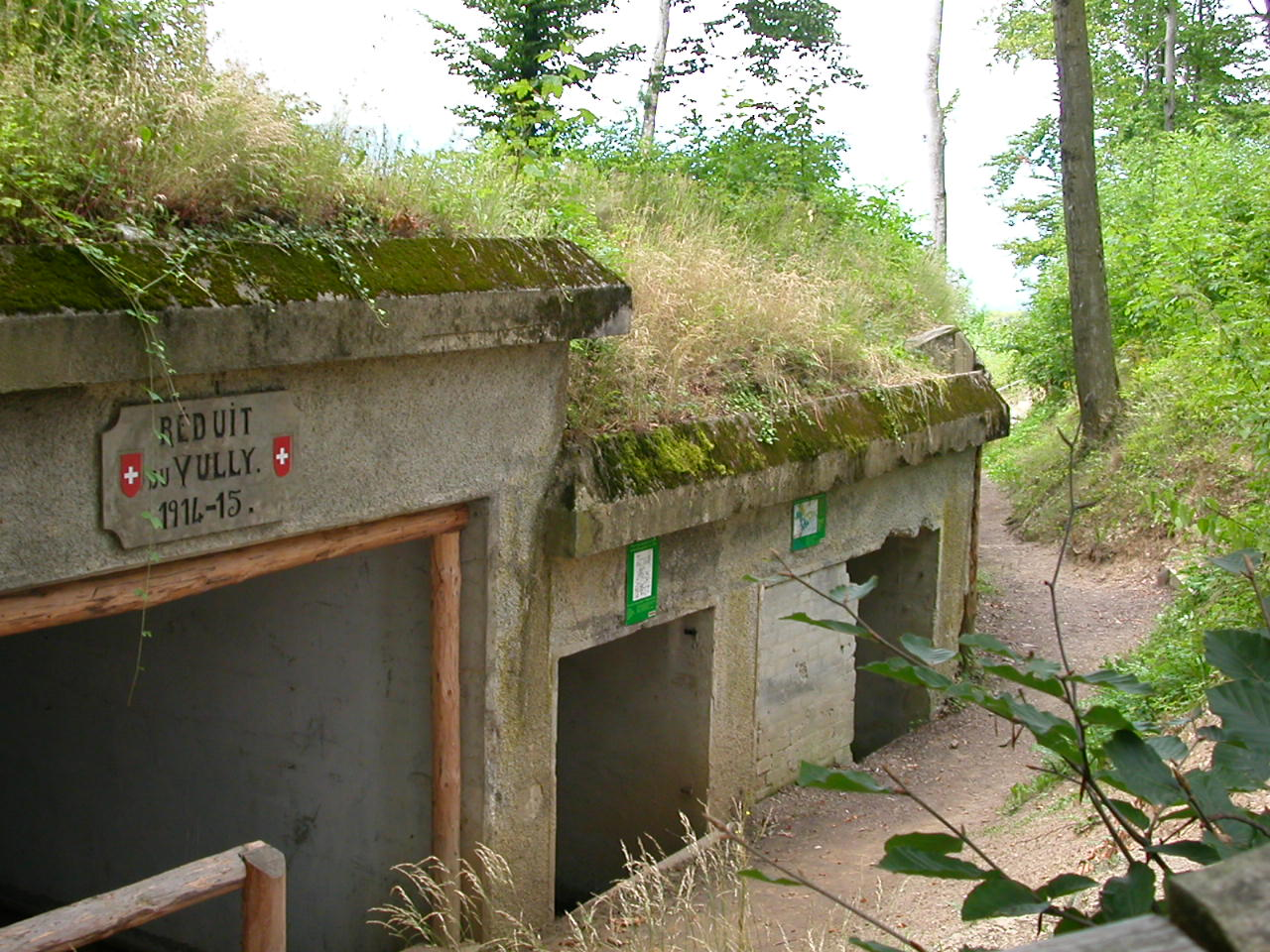 Fortifications édifiées sur le mont Vully en Suisse (FR) au cours de la première Guerre mondiale